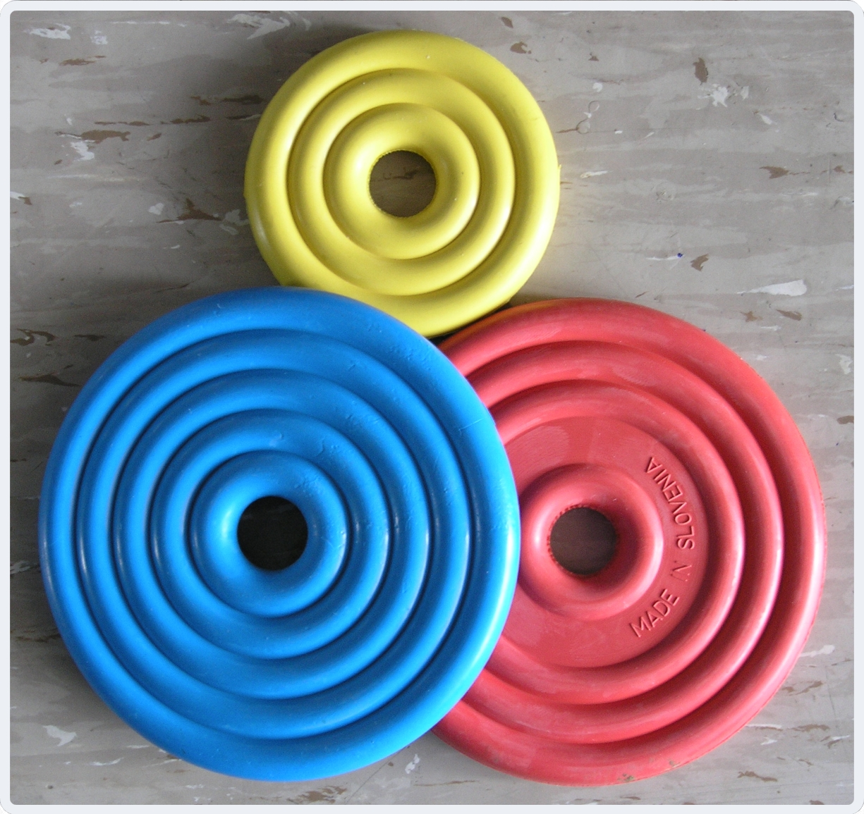 Balinček in ploščka za prstomet.